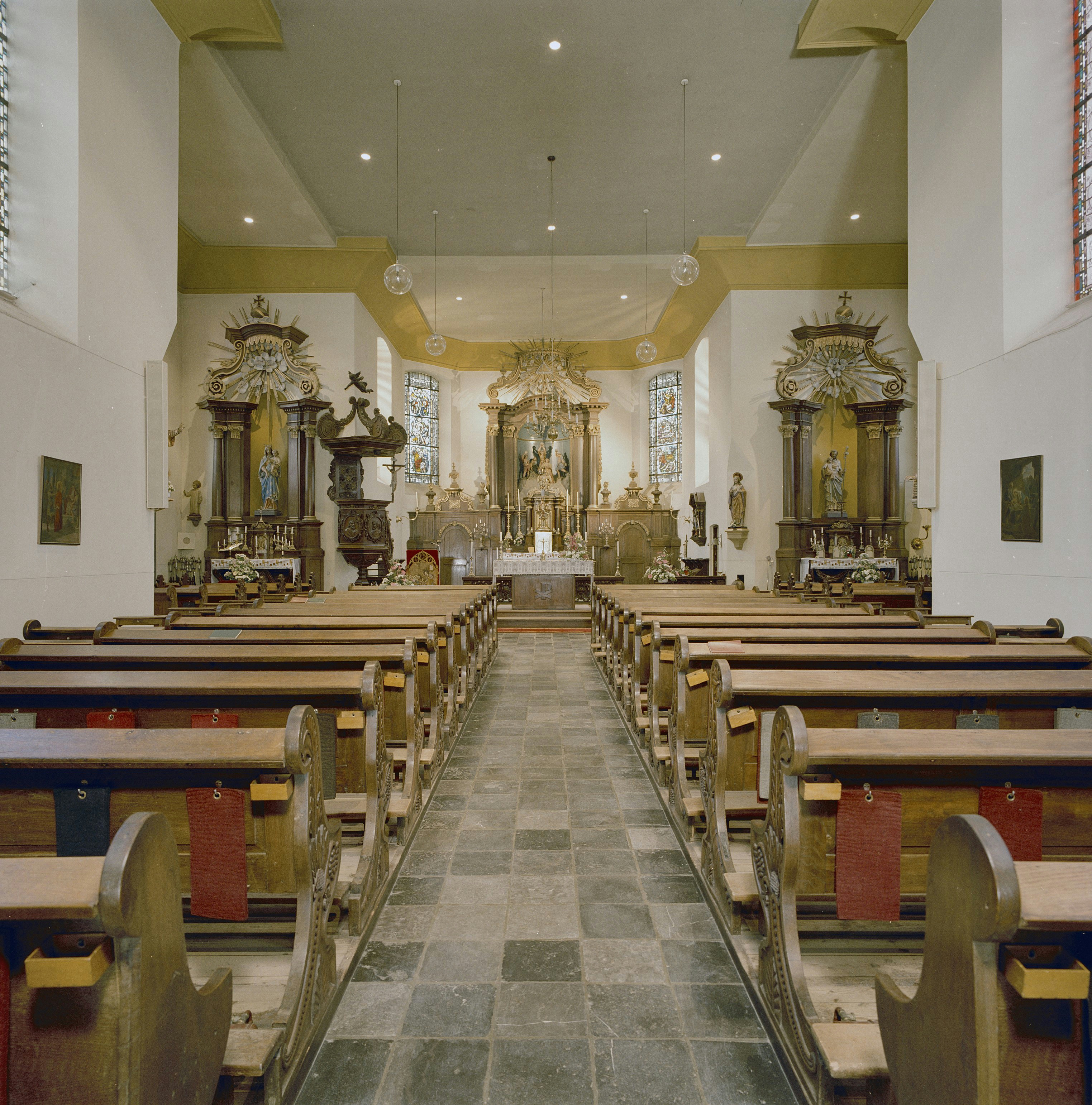 Sint Stefanuskerk: INTERIEUR, NAAR HET KOOR, OVERZICHT